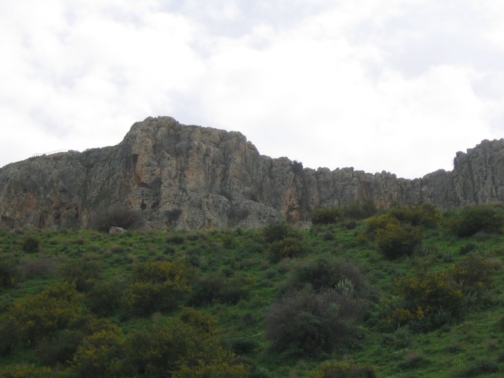 מצוק הארבל